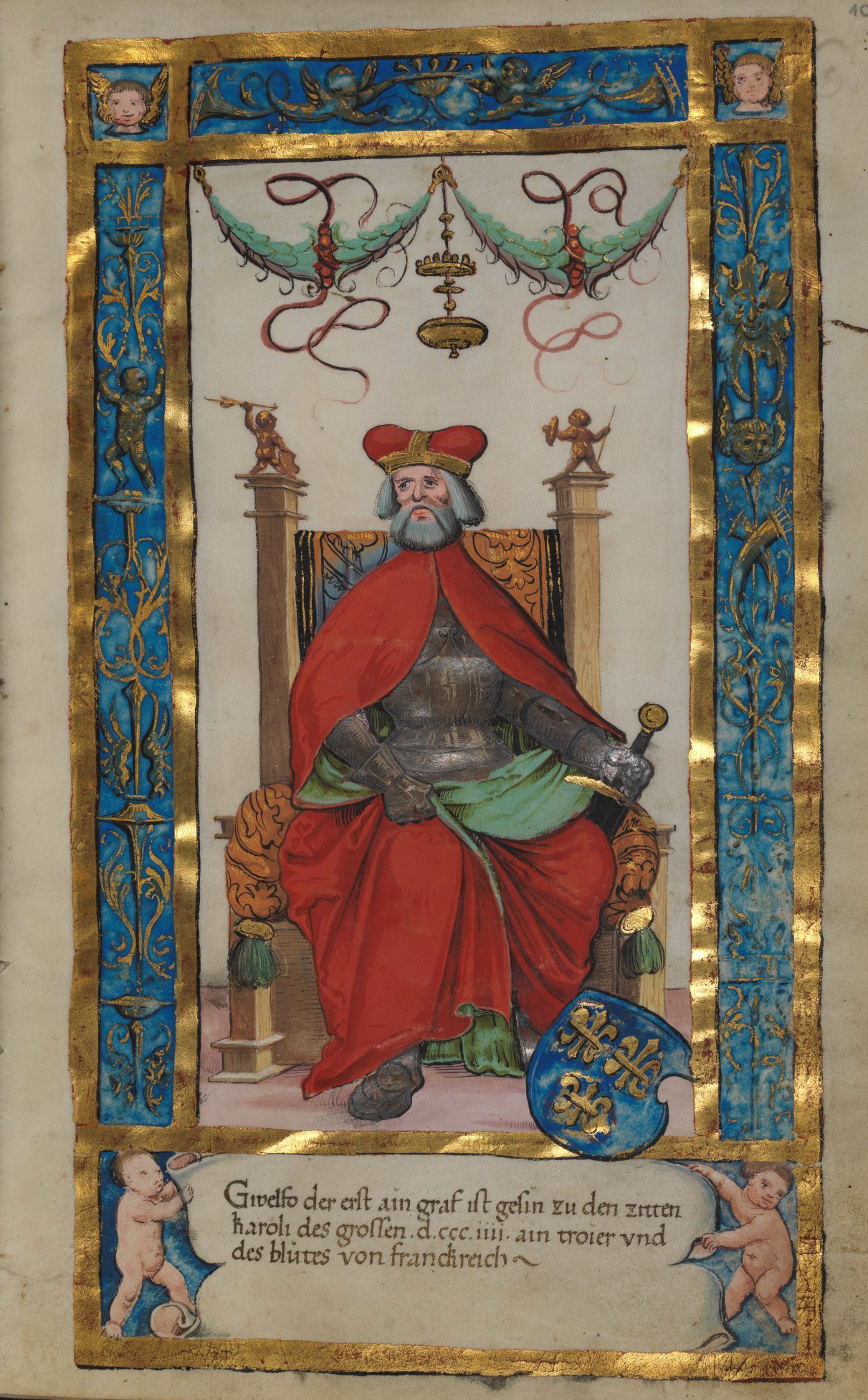 Weingartener Stifterbüchlein, Württembergische Landesbibliothek Stuttgart, Cod.hist.qt.584, fol. 10r, Stifterbild Welf I. Gwelfo der erst ain graf ist gesin zu den zitten karoli des grossen .d.ccc.iiii. ain troier vnd des bluotes von franckreich